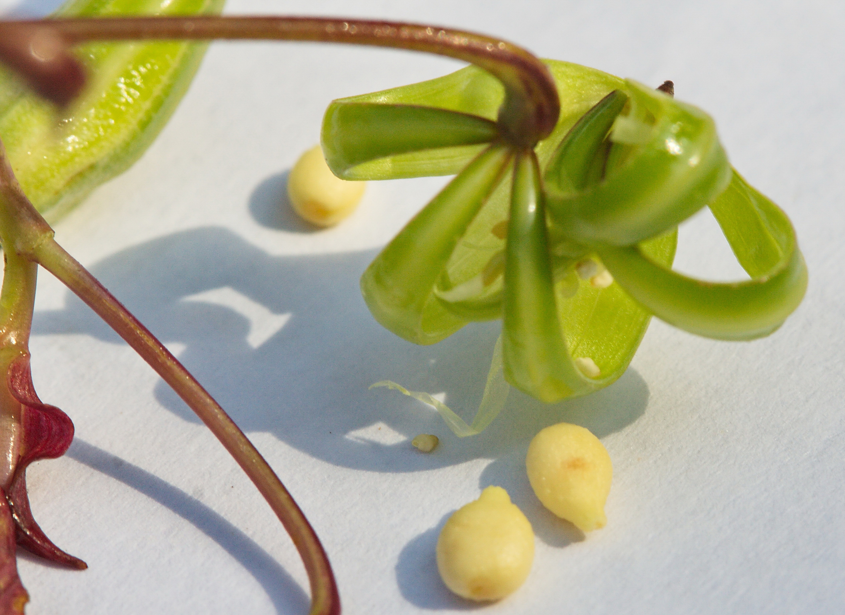 Drüsiges Springkraut (Impatiens glandulifera)